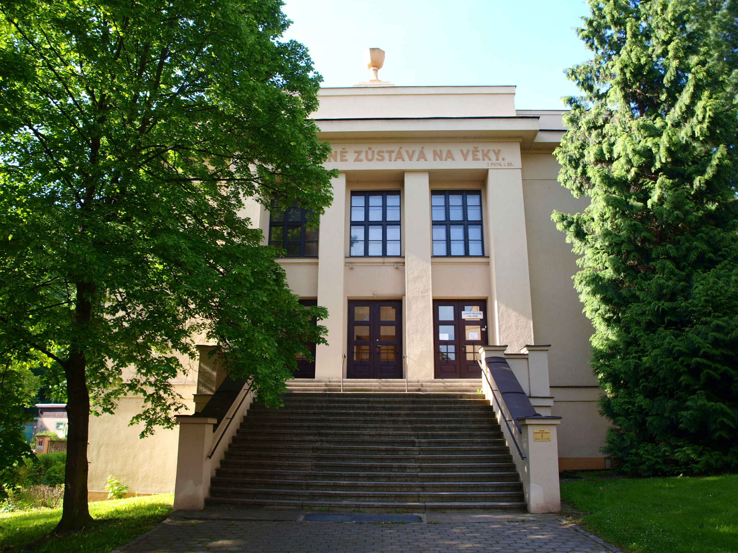 Sbor Českobratrské církve evangelické v Praze na Smíchově (Santoška)